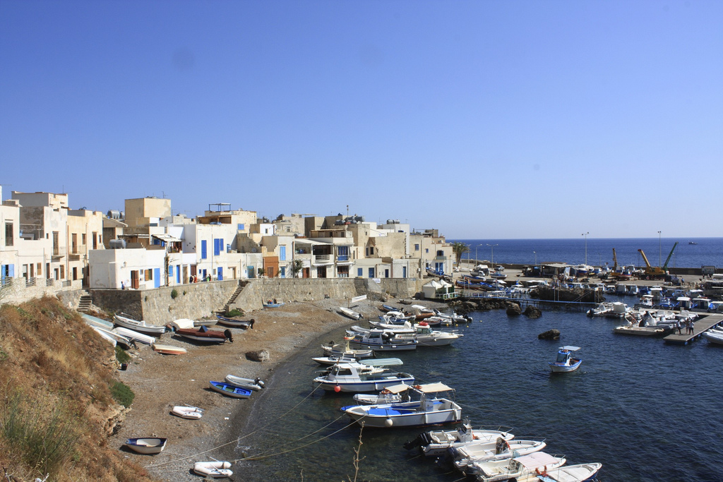 marettimo